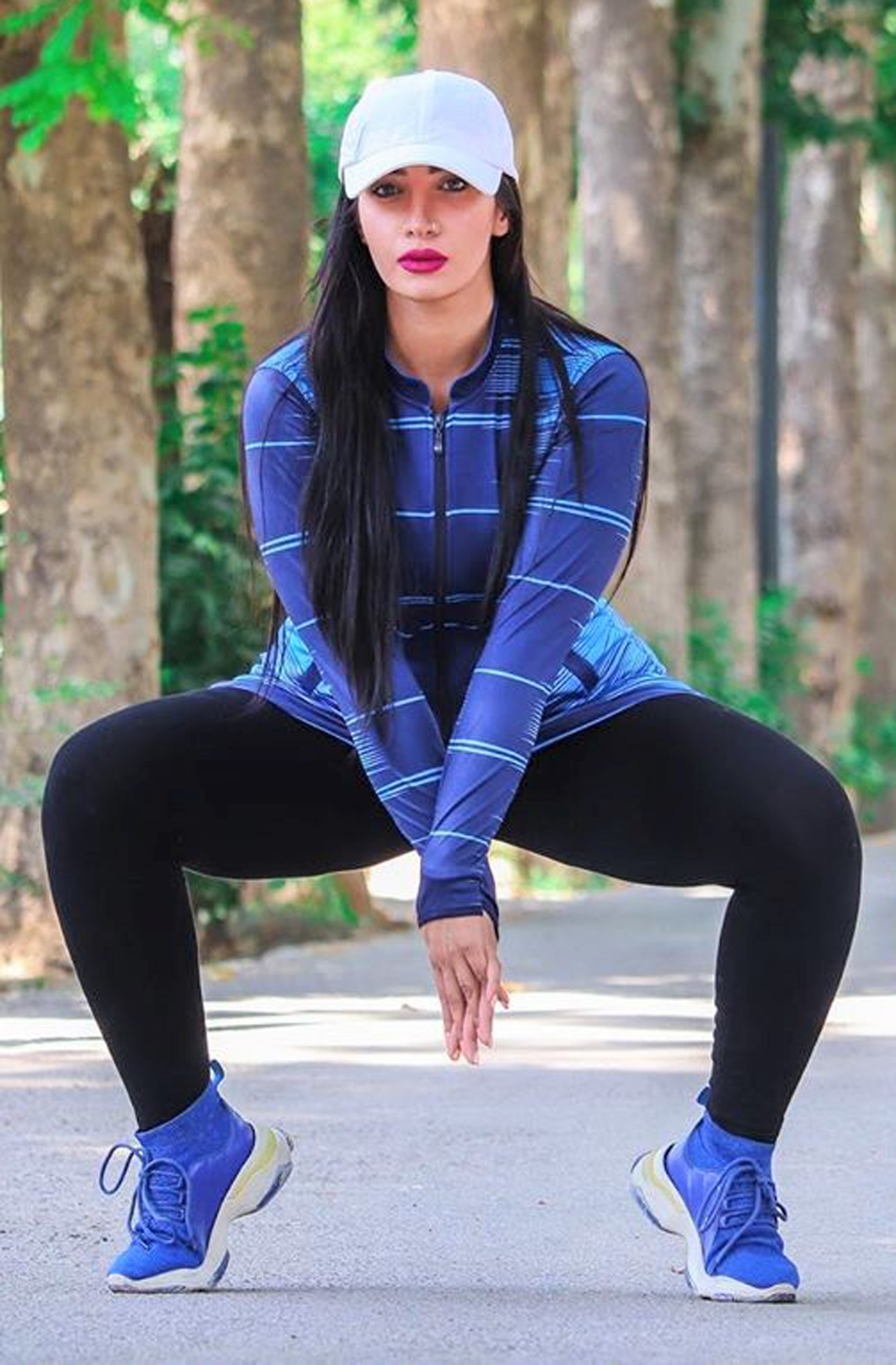 مدل و طراح فشن ایرانی، سارا آهنگی در باغ فاتح ، همچنین دارای سابقه کار در کرج. من عکاس این تصویر هستم و این تصویر را شما می توانید به شکل رایگان و بدون هیچ شرطی برای هر منظوری استفاده کنید. استفاده تجازی هم آزاد است و مانعی ندارد. لطفا پایین را ببینید برای اطلاعات بیشتر. خود مدل می تواند از تصاویر استفاده کند اما با همین مجوز ذکر شده در صفحه.